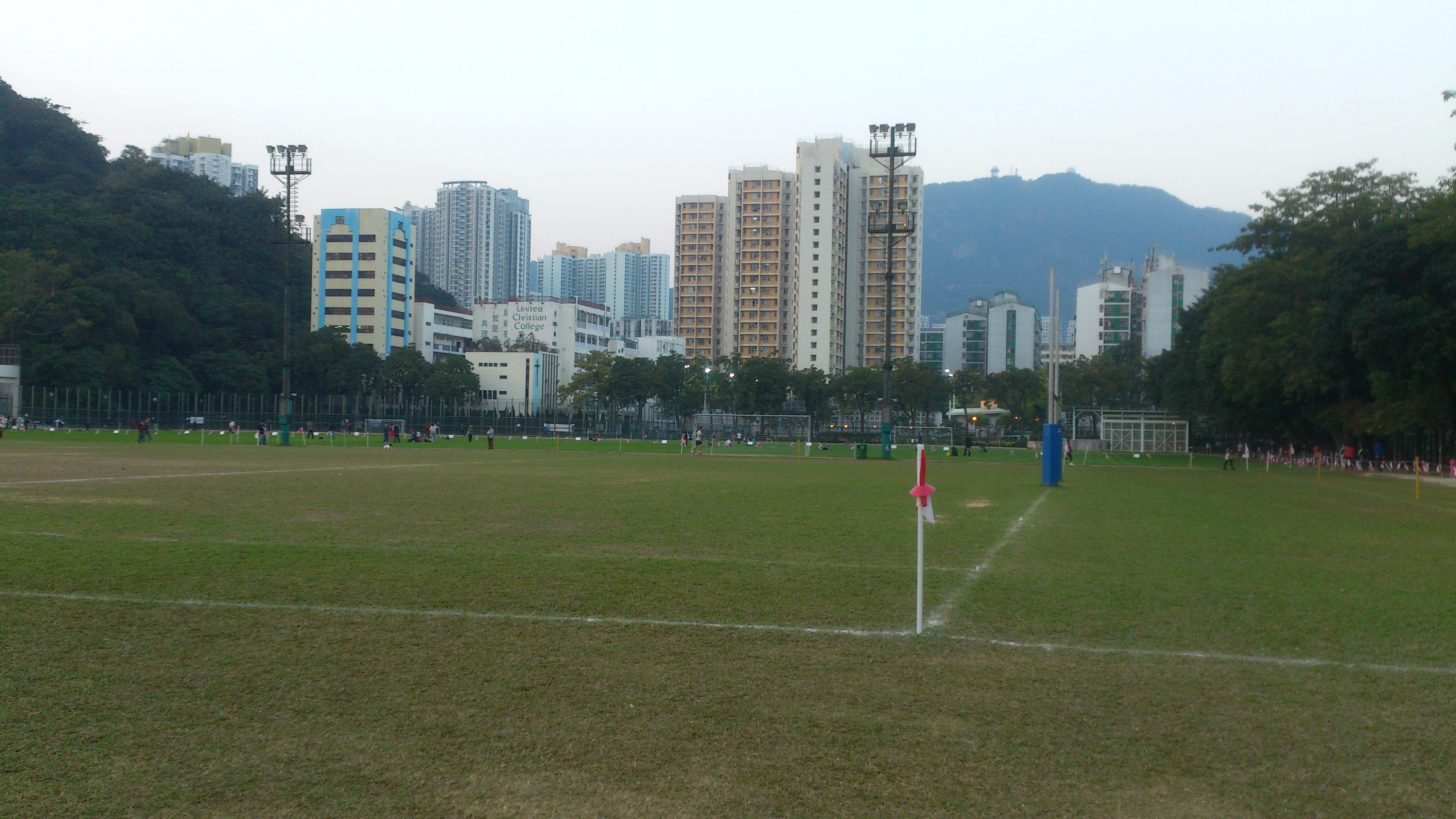 Hong Kong